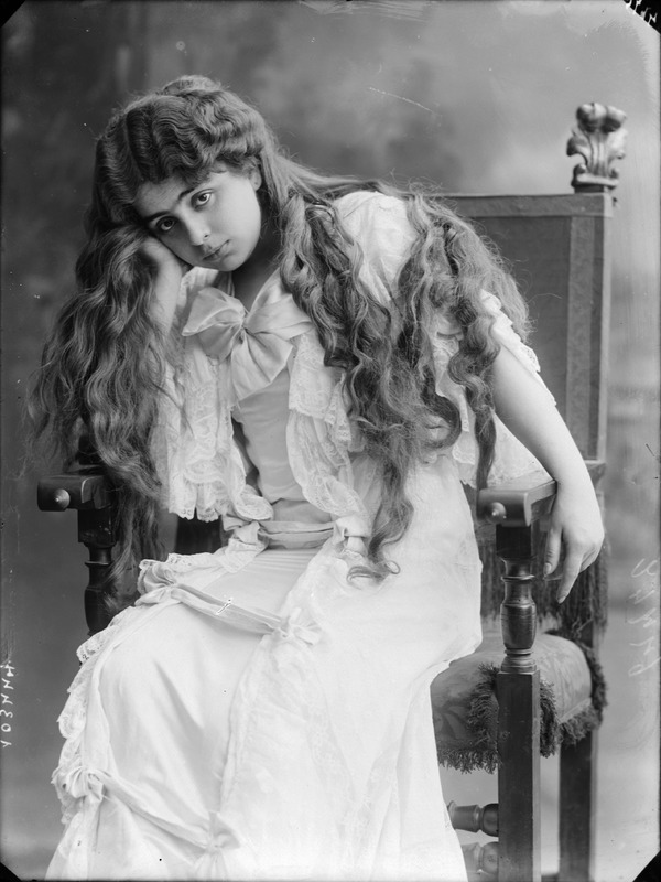 Ada Sari fotografata da Mario Nunes Vais